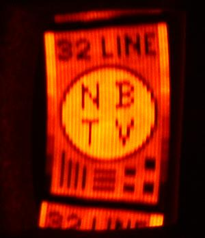 This is a screenshot of the NBTV testcard on a 32 line system